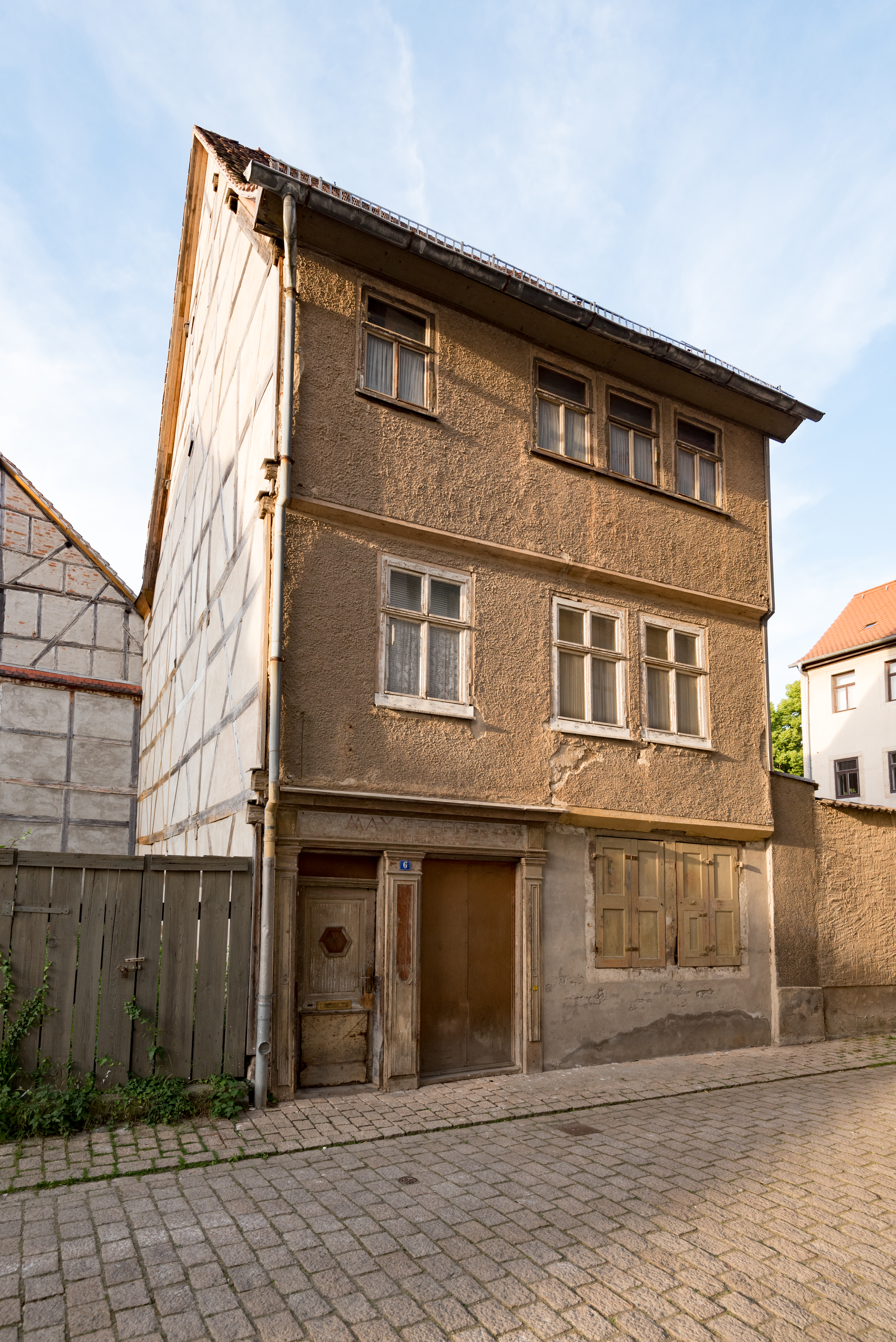 Naumburg (Saale), Mariengasse 6